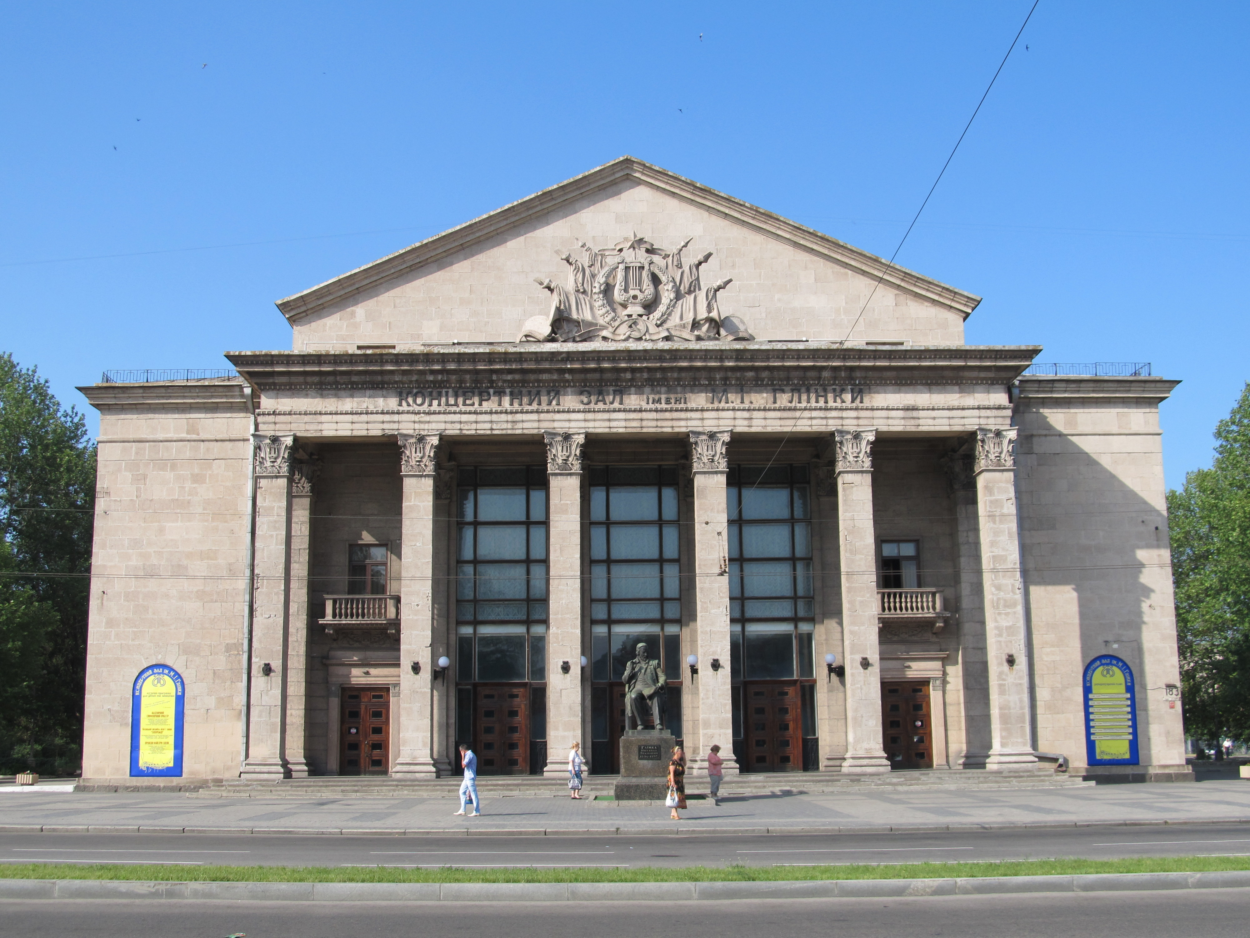 Кіноконцертний зал ім. М. І. Глінки, Запоріжжя, пр-т Соборний, 183